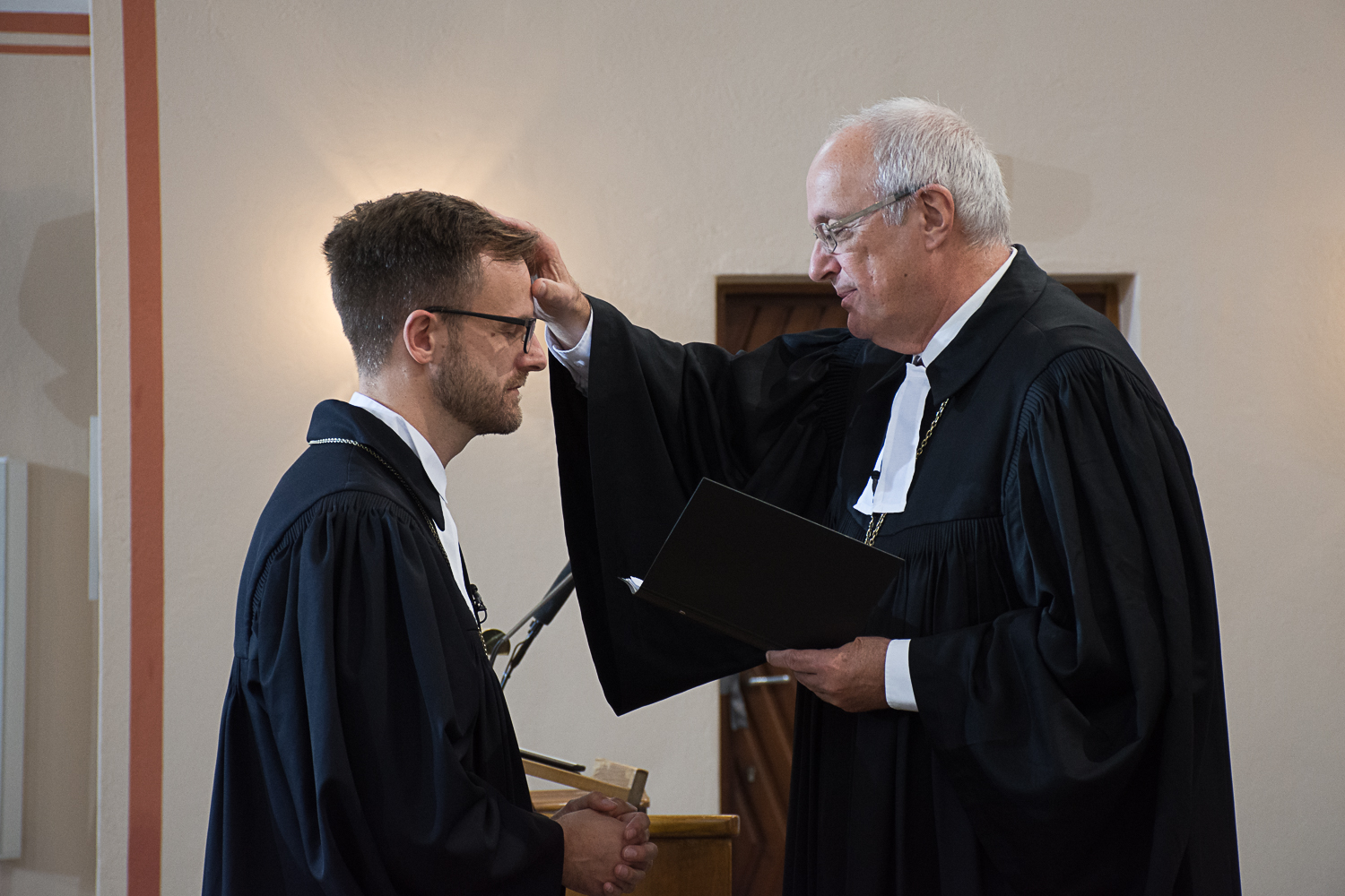 Bischof Michael Bünker segnet Lars Müller-Marienburg zu dessen Amtseinführung als Superintendent von Niederösterreich.